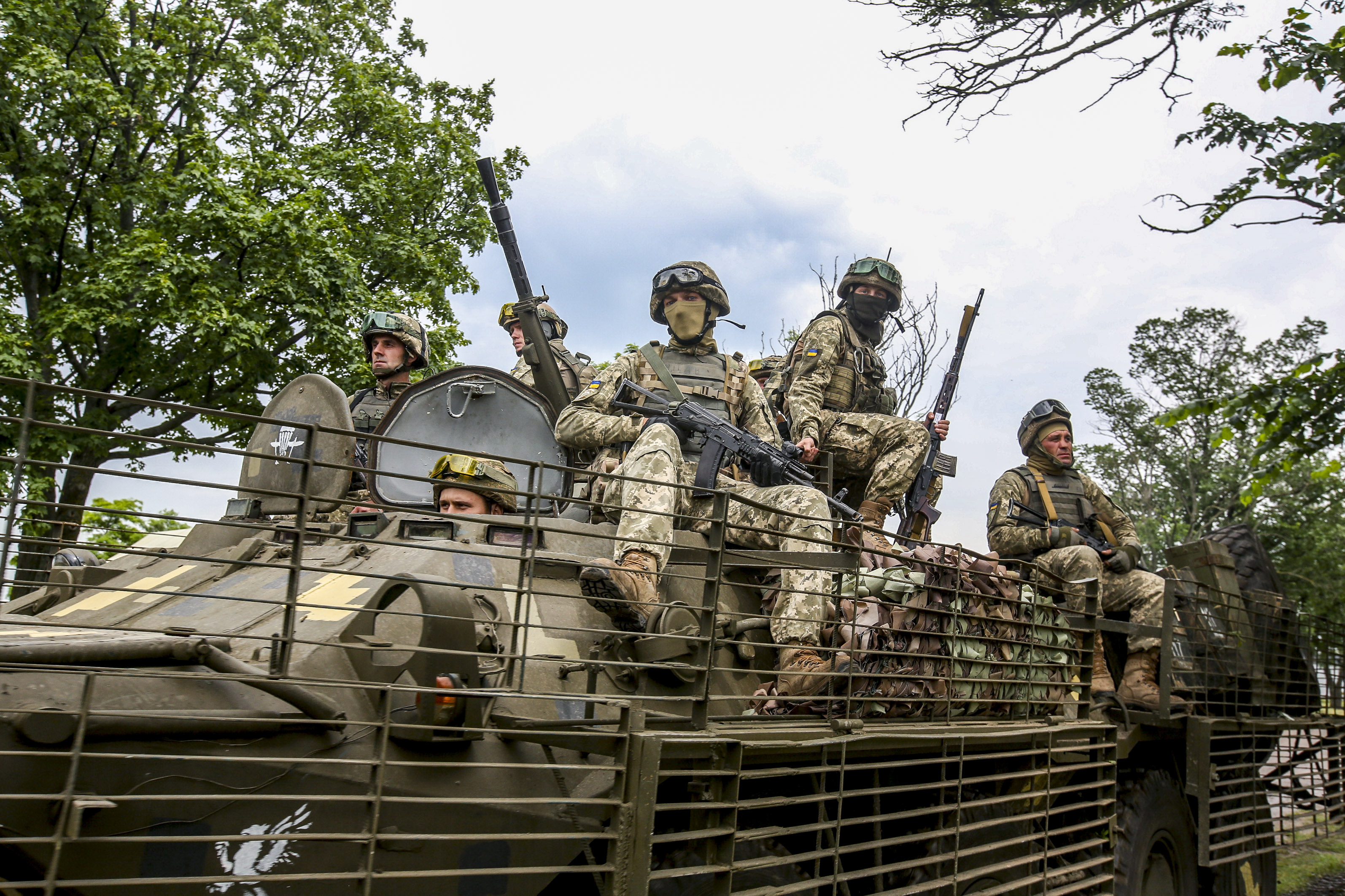 Робоча поїздка до Миколаївської області.